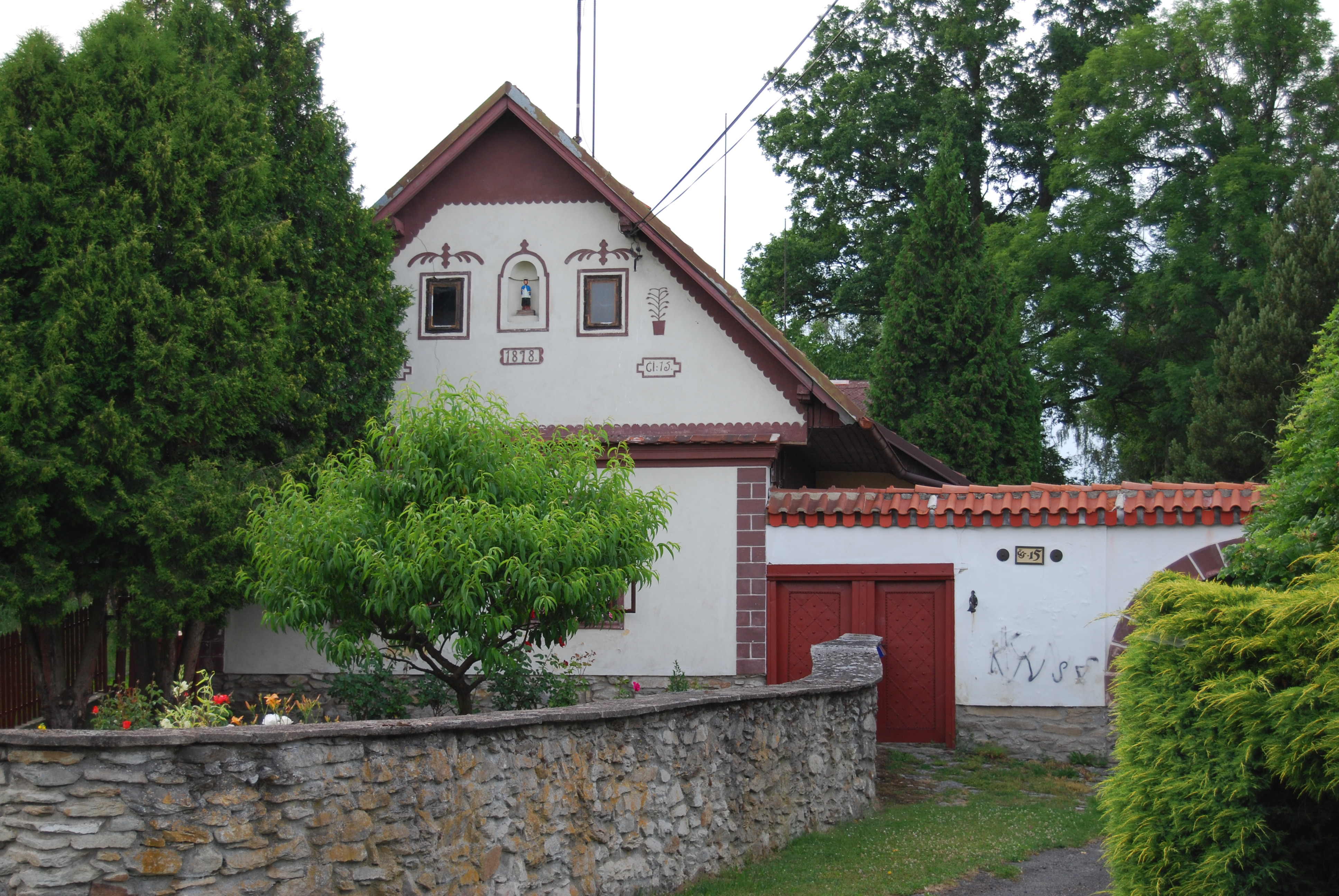 Venkovská usedlost čp.15. Skrýchov u Opařan - část obce Opařany v okrese Tábor. Česká republika.